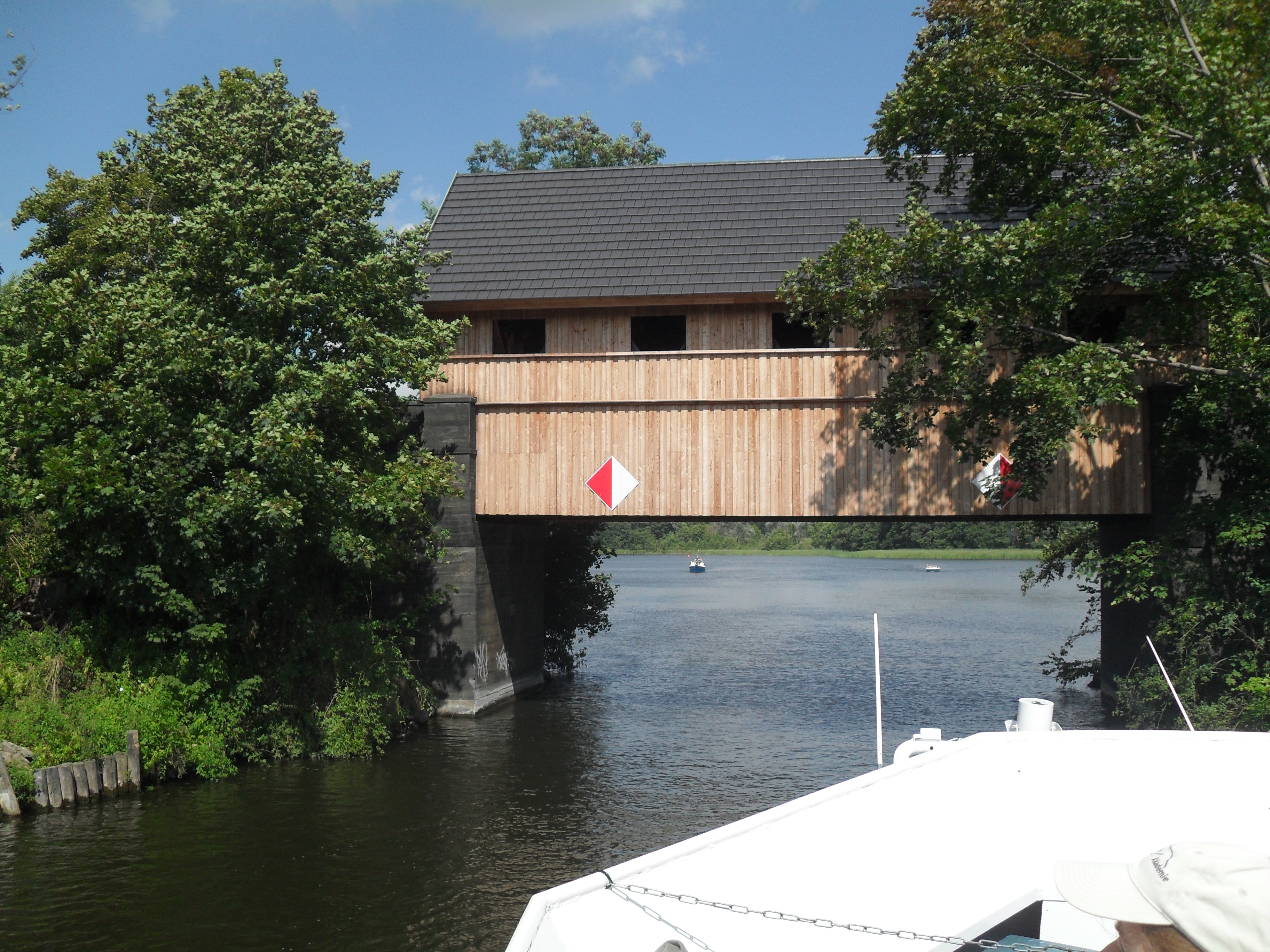 Hausbrücke über die Havel zwischen dem Drewensee und dem Finowsee bei Ahrensberg (Wesenberg(Mecklenburg)